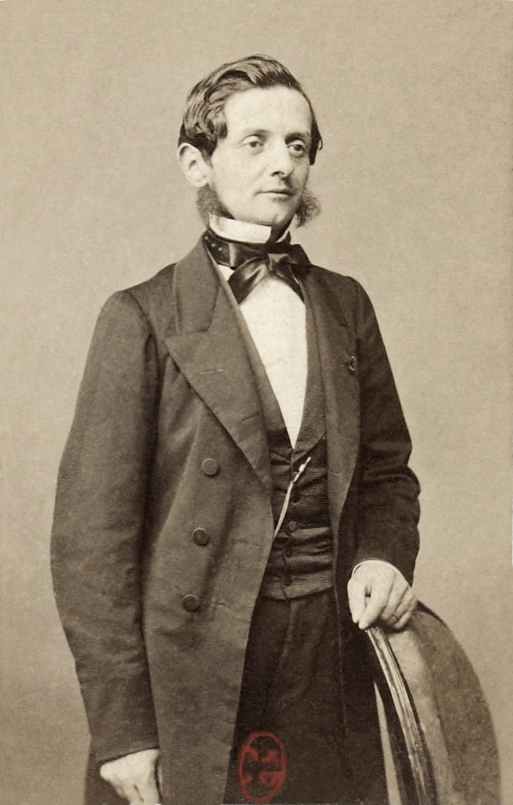 Ernest Pinard (1822 - 1909) magistrat et homme politique sous le Second Empire.